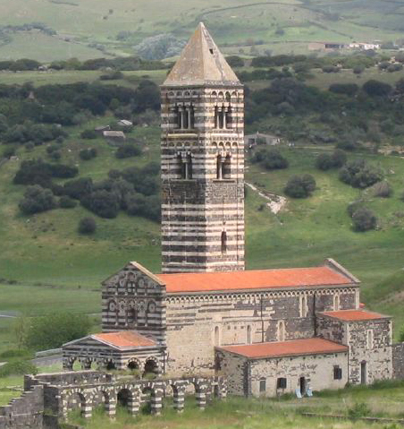 Codrongianos, Sardegna, Italia